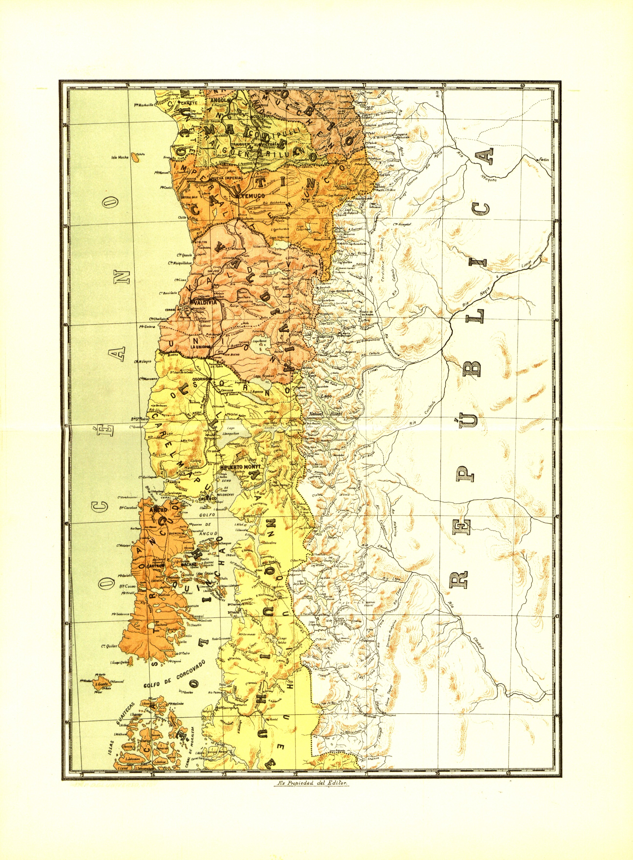 Mapa de Chile 1904 publicada por Carlos Tornero en Chile descripción física, política, social industrial y comercial de la república de Chile